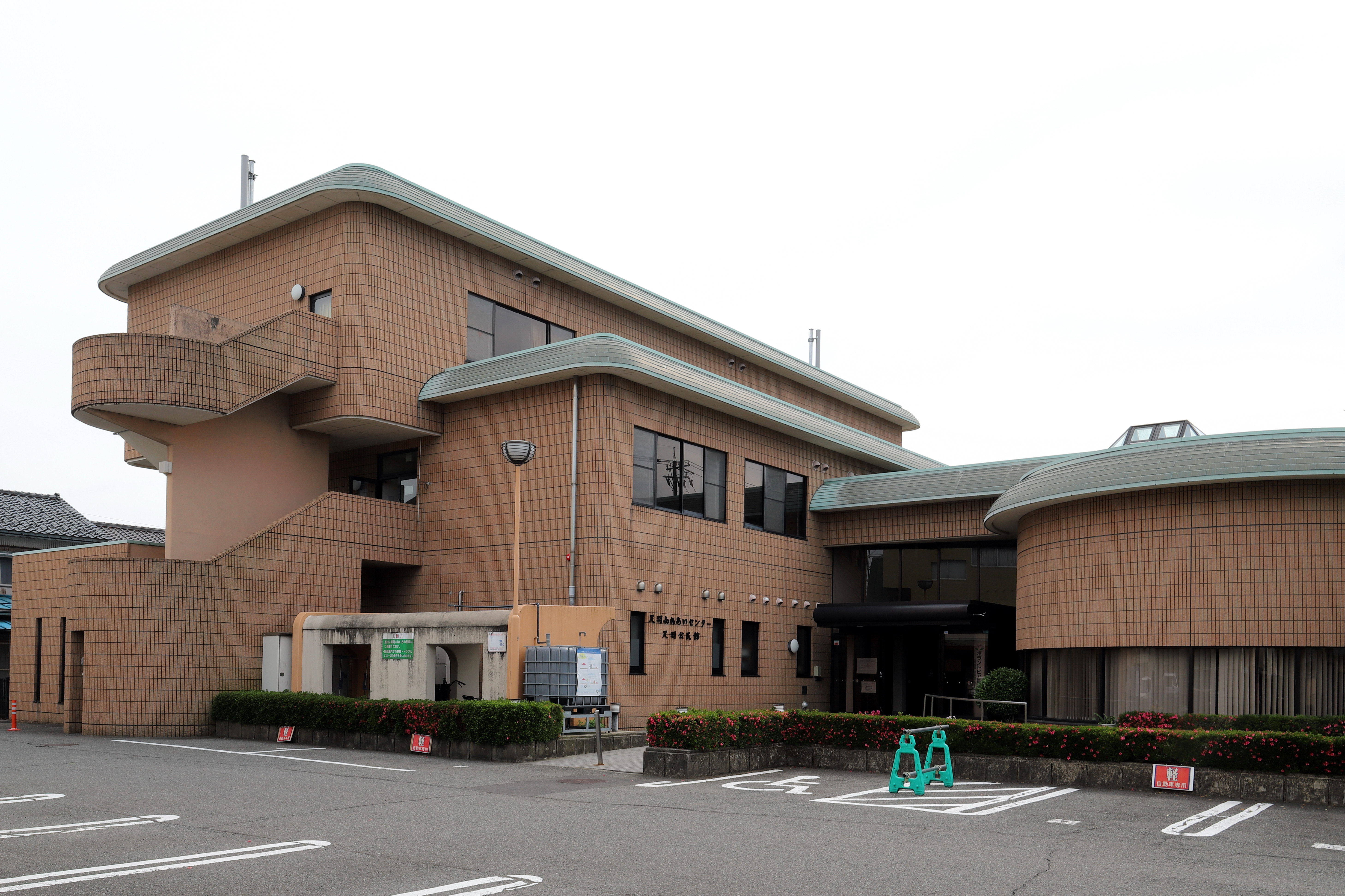 足羽ふれあいセンター Canon EOS 6D Mark II